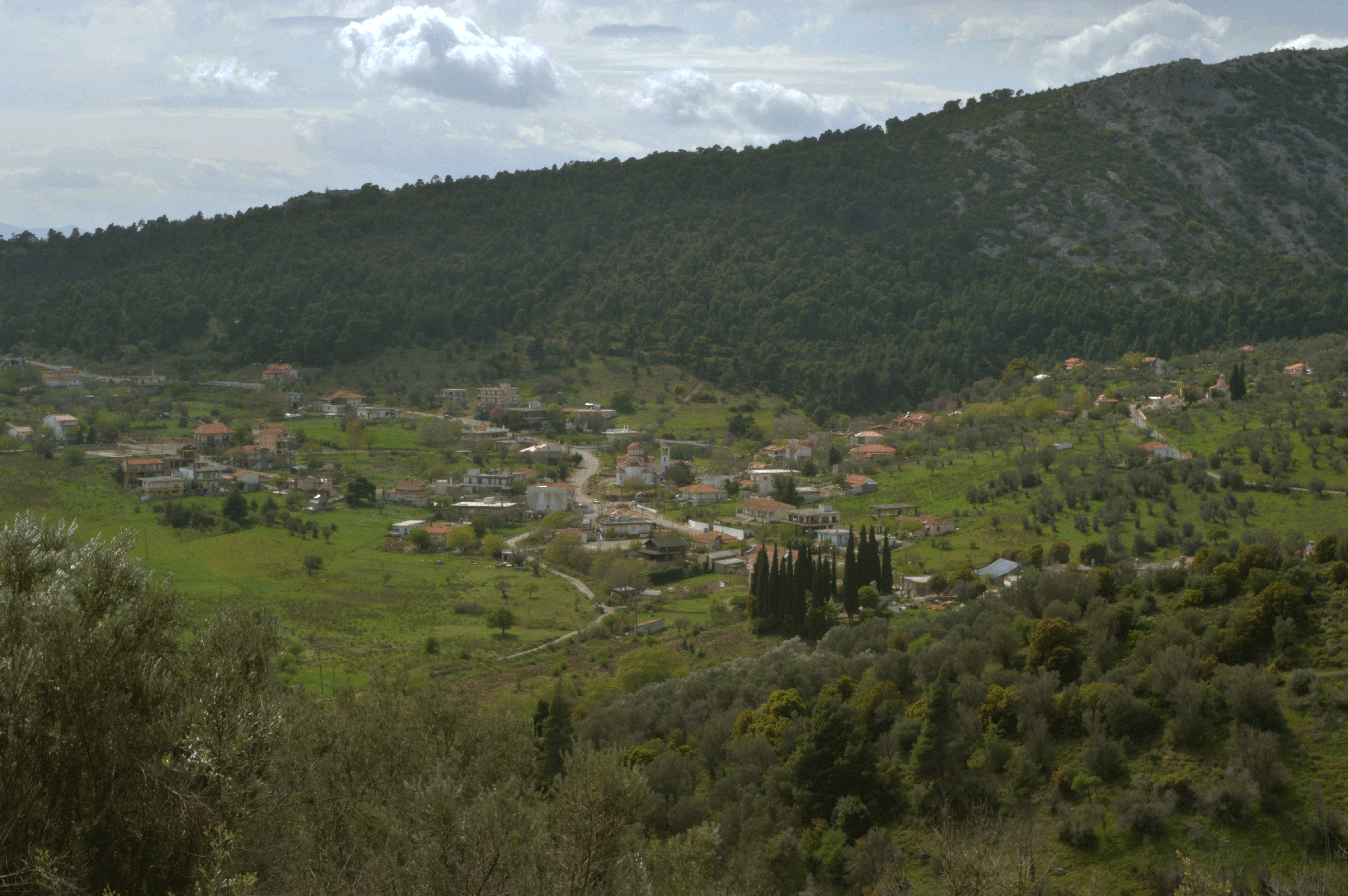 Ανατολική όψη του χωριού